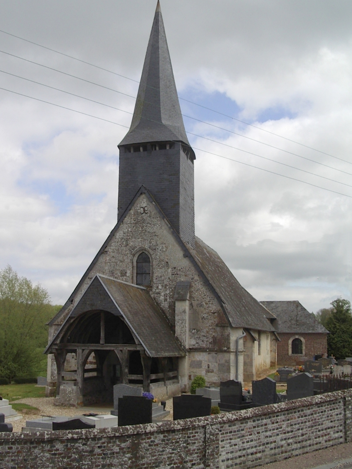 Eglise de Fontaine-la-Louvet (France, Eure)